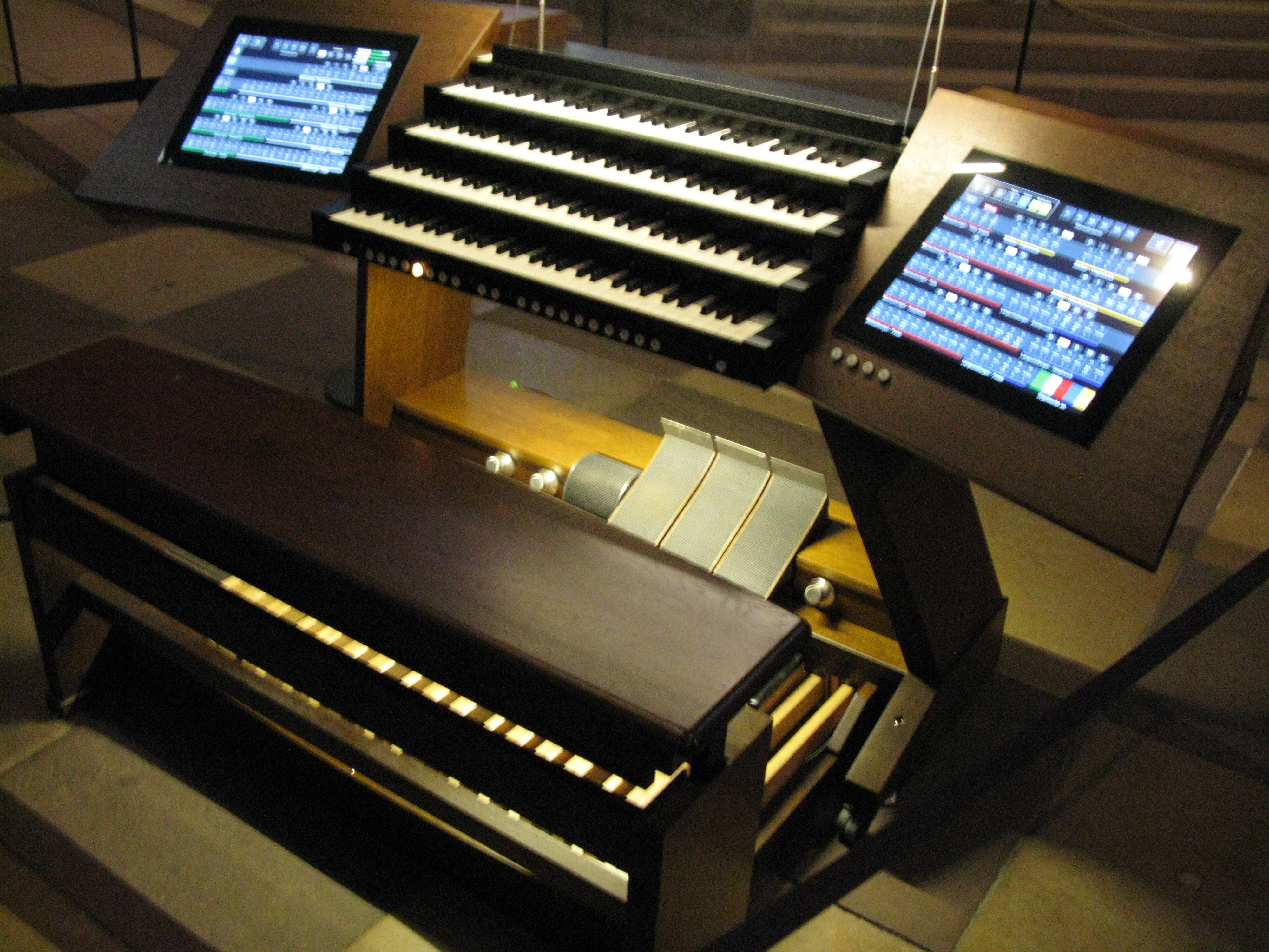 mobiler Orgelspieltisch des Freiburger Münsters